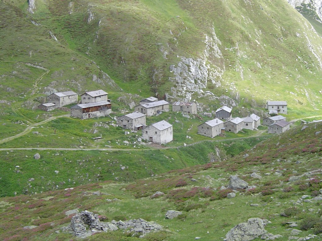 Jagdhausalm im hinteren Defereggental in Osttirol